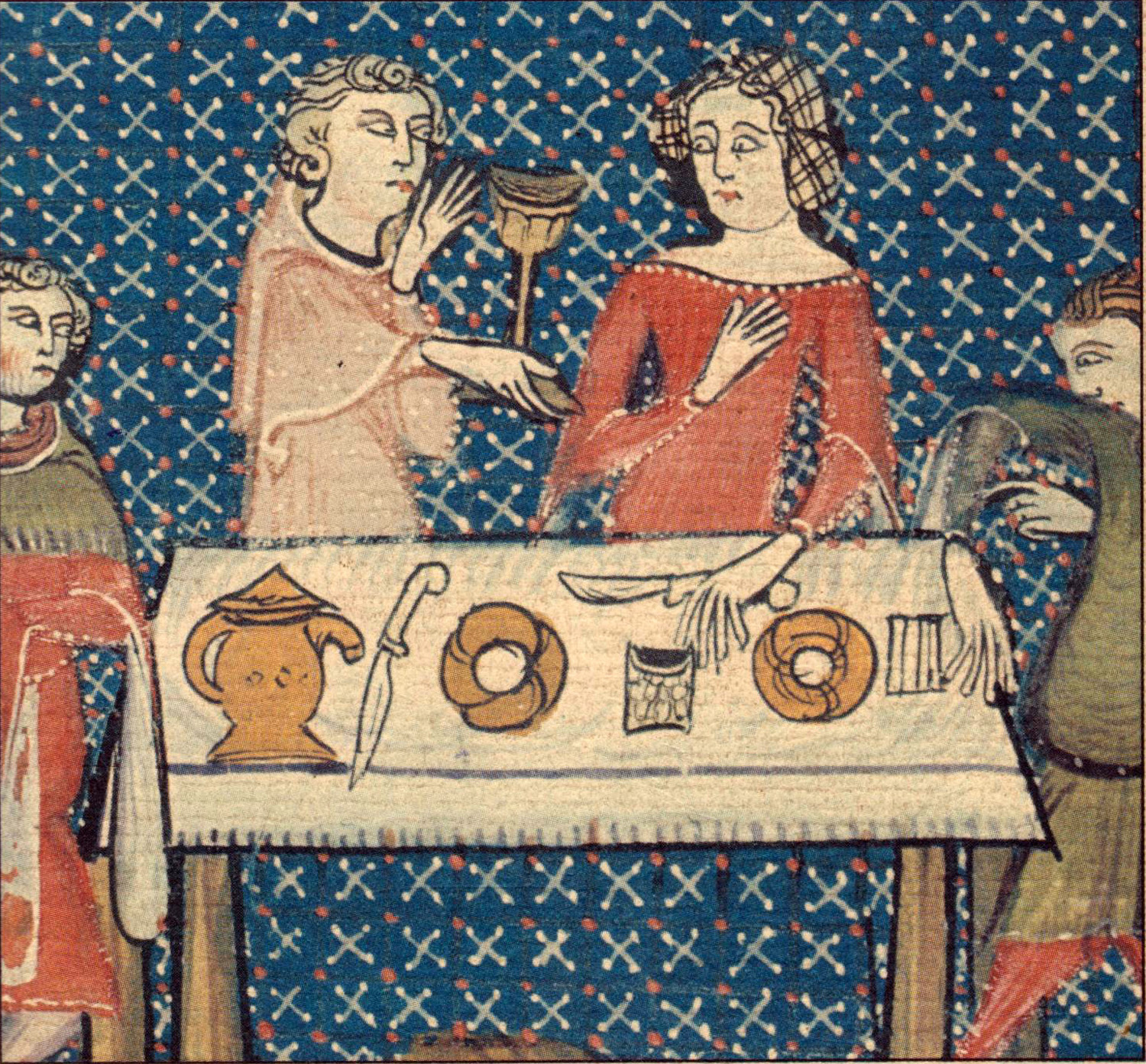 Miniature du Livre d'heures de la reine Yolande Dégustation médiévale